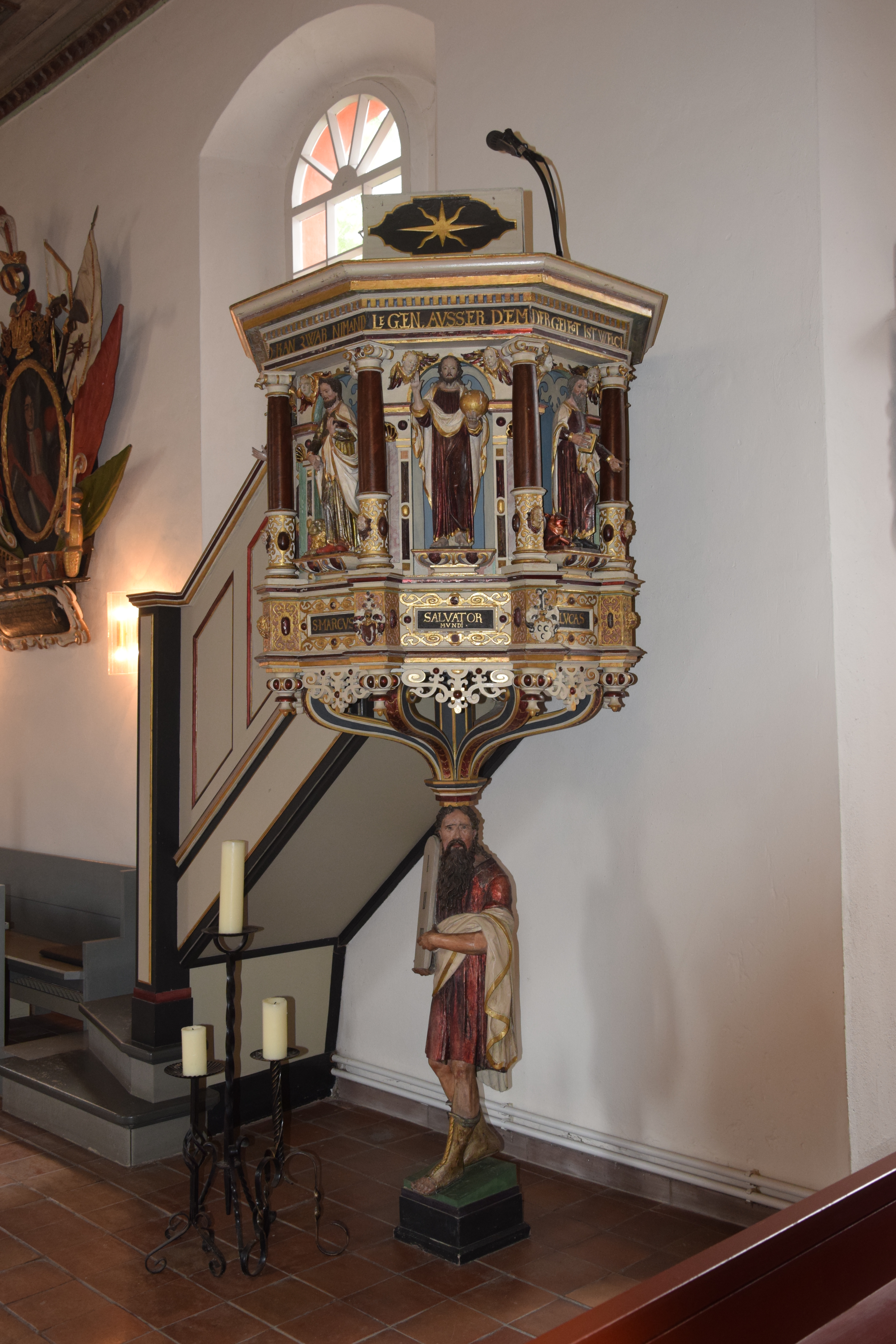 Kanzel der St. Marien-Kirche Wollershausen